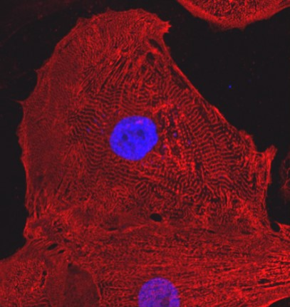 תא גזע מושרה